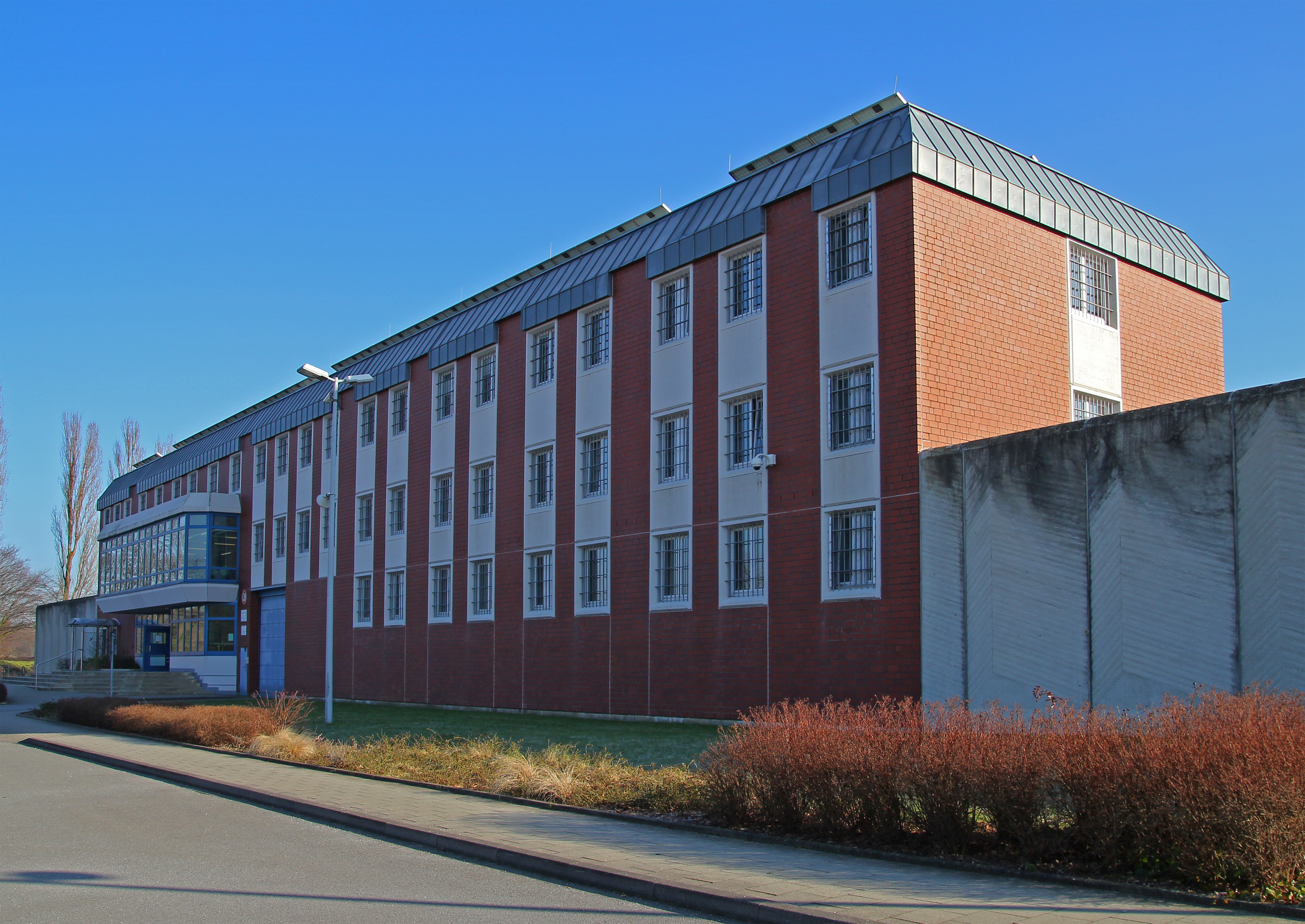 Das Eingangsgebäude der Justizvollzugsanstalt Aachen an der Krefelder Straße